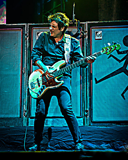 Diego Arnedo ante 65.000 espectadores, Pinamar 2017